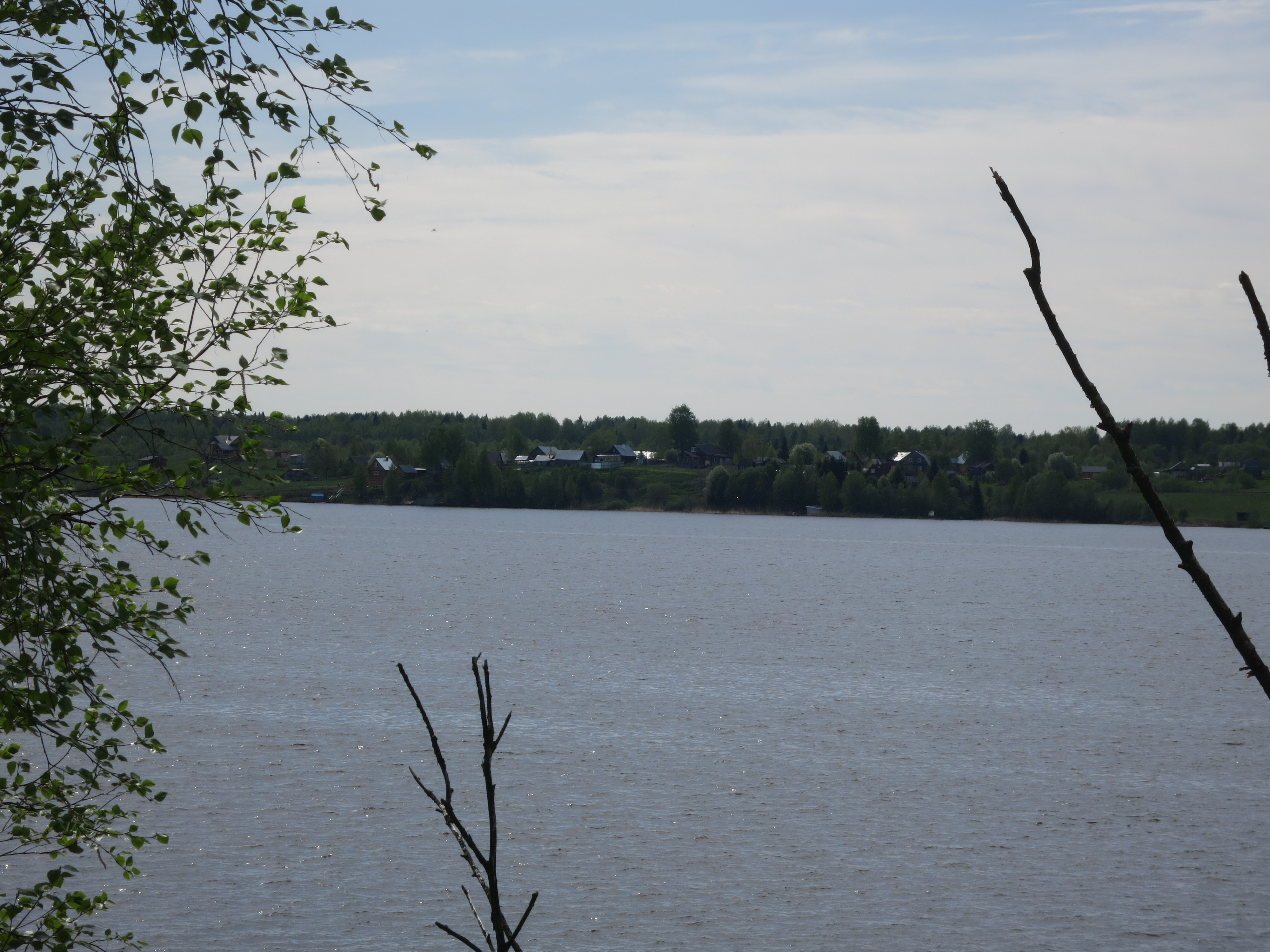 Ивицы, Кирилловский район Вологодской области. Вид с противоположного берега Шексны, из села Горицы